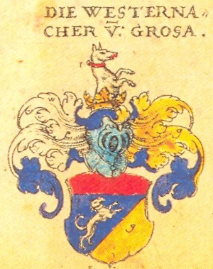 Westernach von Grosa freigestellt aus: Johann Siebmacher: New Wappenbuch eingescannt aus: Horst Appuhn (Hrsg.), Johann Siebmachers Wappenbuch. Die bibliophilen Taschenbücher 538, 2. verb. Aufl , Dortmund 1989 Rheinische Blatt 128